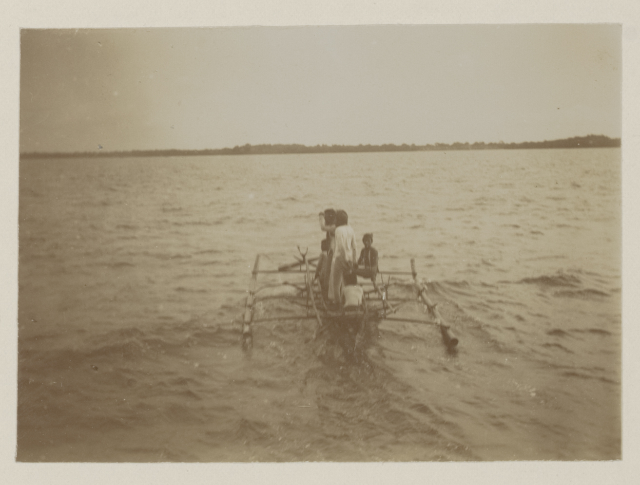 Academische Collecties: 1899-1900, Siboga-expeditie naar Nederlands Oost-Indië, onder leiding van Max Wilhelm Carl Weber Gezicht op het eiland, op de voorgrond een trimaran met inlanders.